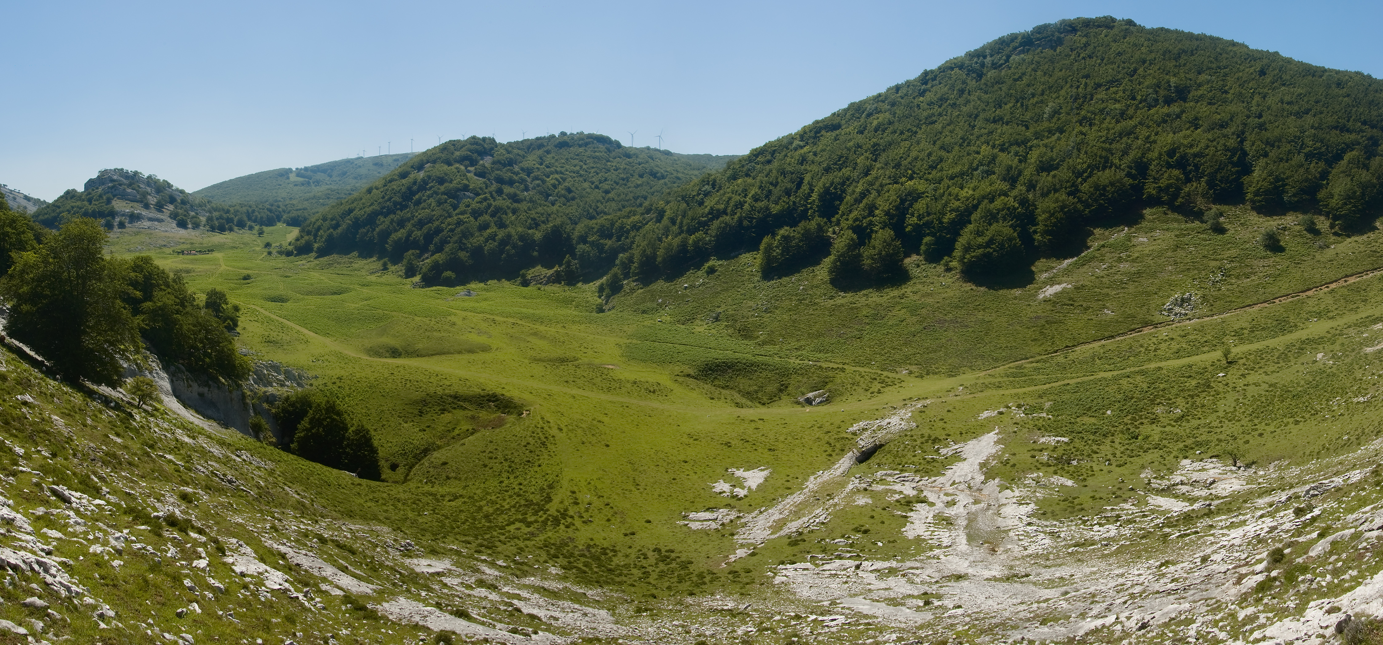 Degurixako mendebaldea Arlutzeko magaletik. Hainbat tontorren artean, Atain nabarmentzea da eskuinean. You can contribute by translating this description into more languages.